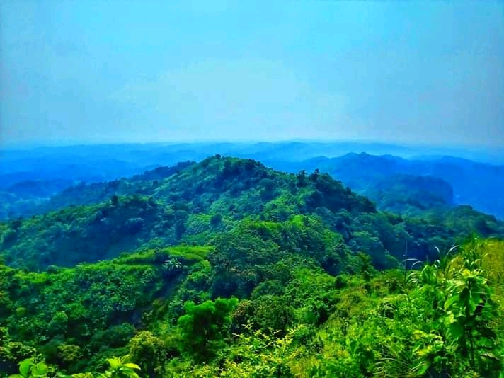 চন্দ্রনাথ পাহাড়,সীতাকুণ্ড